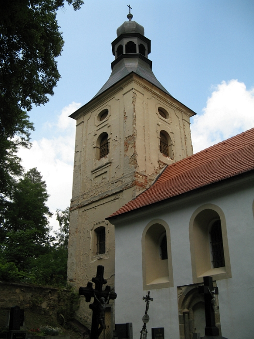 Kostel svatého Jana Křtitele, západní okraj vsi, Stražiště.